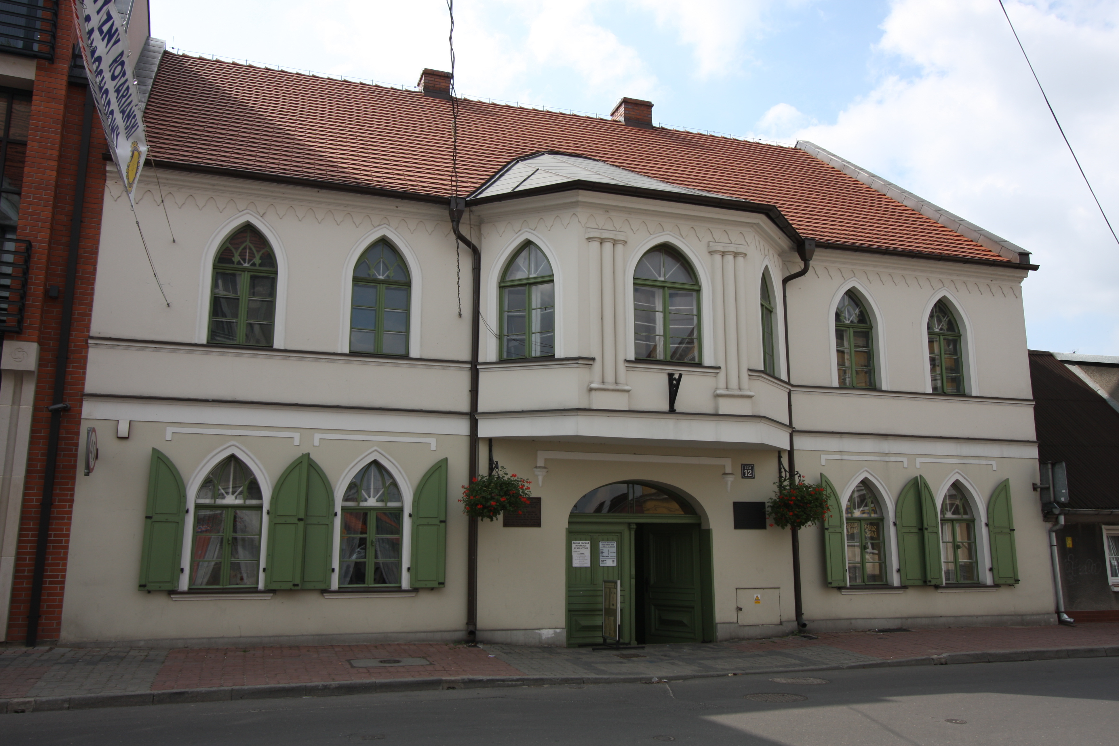 Wolsztyn, dom Roberta Kocha, mur., 1 ćw. XX, ul. Kocha 12